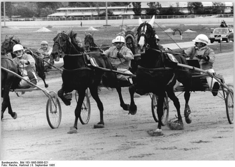 Berlin, Trabrennen, Rennfeld ADN-ZB Reiche 8.9.1985-St.-Berlin:Traber-Derby der DDR-Kurz vor dem Zieleinlauf auf der 2600-Meter-Strecke beim Traber-Derby der DDR auf der Rennbahn in Karlshorst. Der von Werner Bandermann trainierte Romulus (rechts) aus dem VE Rennstall Dubrow gewann diese wichtigste Dreijährigenprüfung der Saison. Romulus leistete sich auf der langen Distanz keinen Fehler und gewann im Spurt knapp vor Ameise und Agronom. Für Werner Bandermann war es bereits der fünfte Sieg in einem Traber-Derby der DDR.